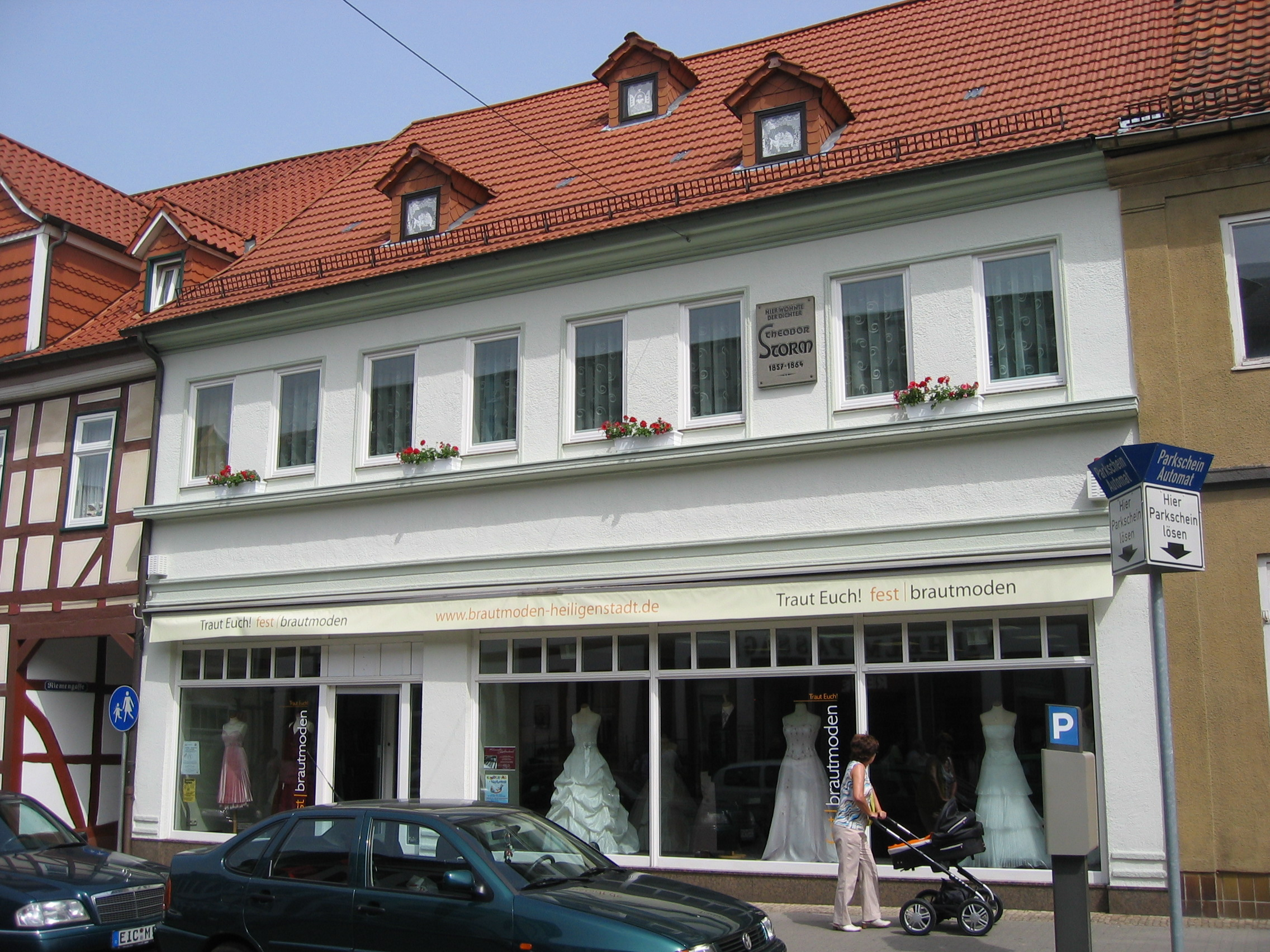 Theodor Storms ehemalige Wohnung in Heilbad Heiligenstadt, Wilhelmstraße 73